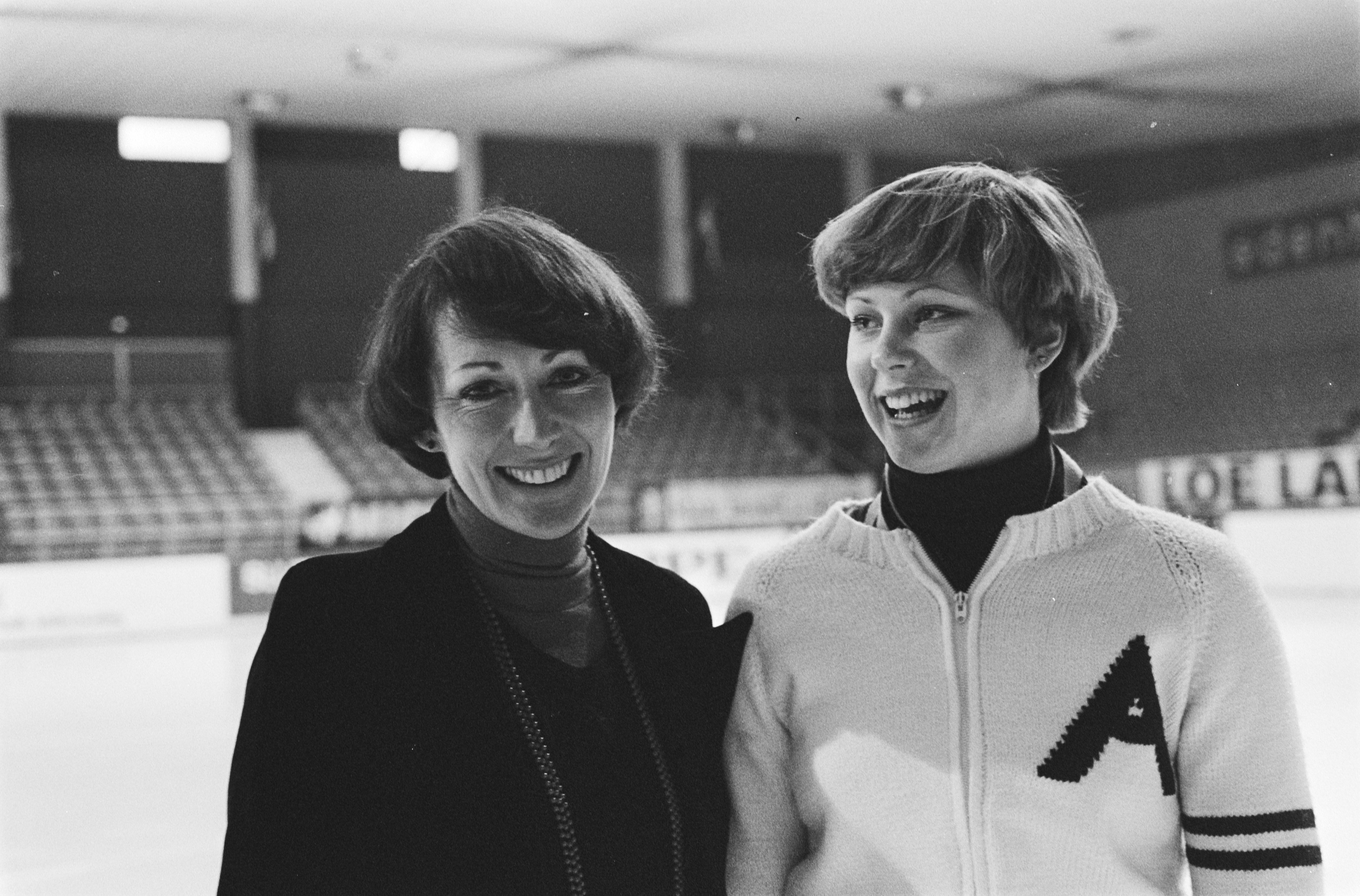 Collectie / Archief : Fotocollectie Anefo Reportage / Serie : [ onbekend ] Beschrijving : Nederlands kunstrijden op de schaat; Astrid Jansen en Joan Haanappel Datum : 11 januari 1979 Trefwoorden : kunstrijden Persoonsnaam : Astrid Jansen, Haanappel, Joan Fotograaf : Pereira, Fernando / Anefo Auteursrechthebbende : Nationaal Archief Materiaalsoort : Negatief (zwart/wit) Nummer archiefinventaris : bekijk toegang 2.24.01.05 Bestanddeelnummer : 930-0720